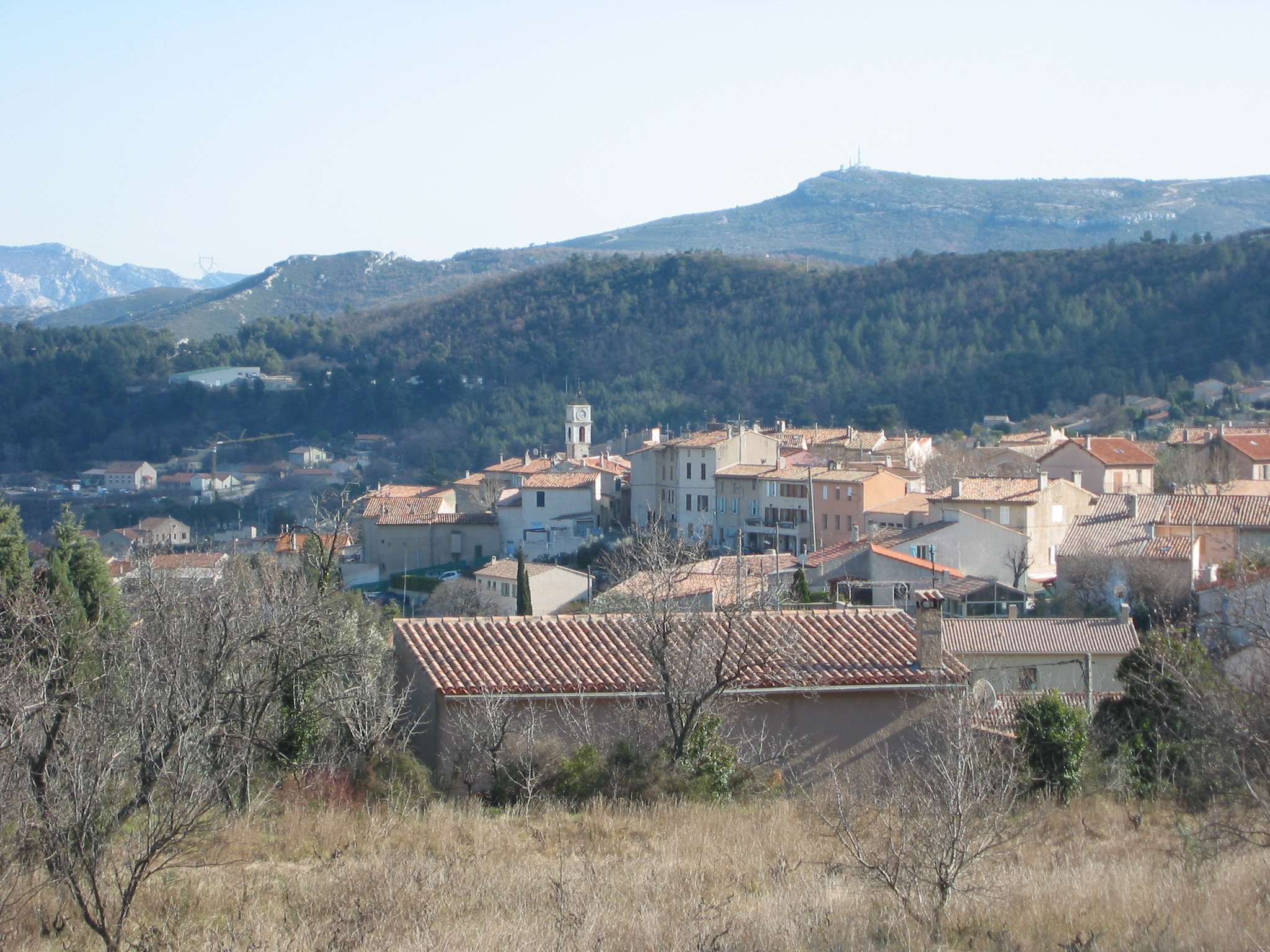 Cadolive, Bouches-du-Rhône, France. Photo prise depuis la D7, à l'entrée ouest du village, côté Saint-Savournin. Photo prise le 1er mars 2006. Auteur : Ludovic Ruat (utilisateur:civodule)